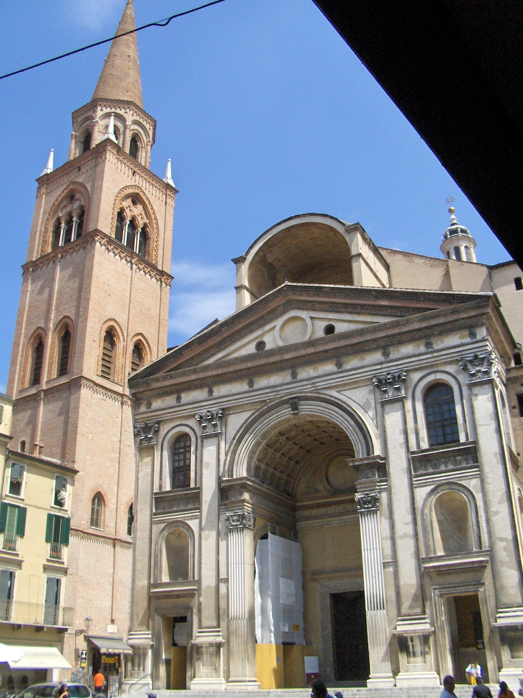 Mantova - Basilica di Sant'Andrea